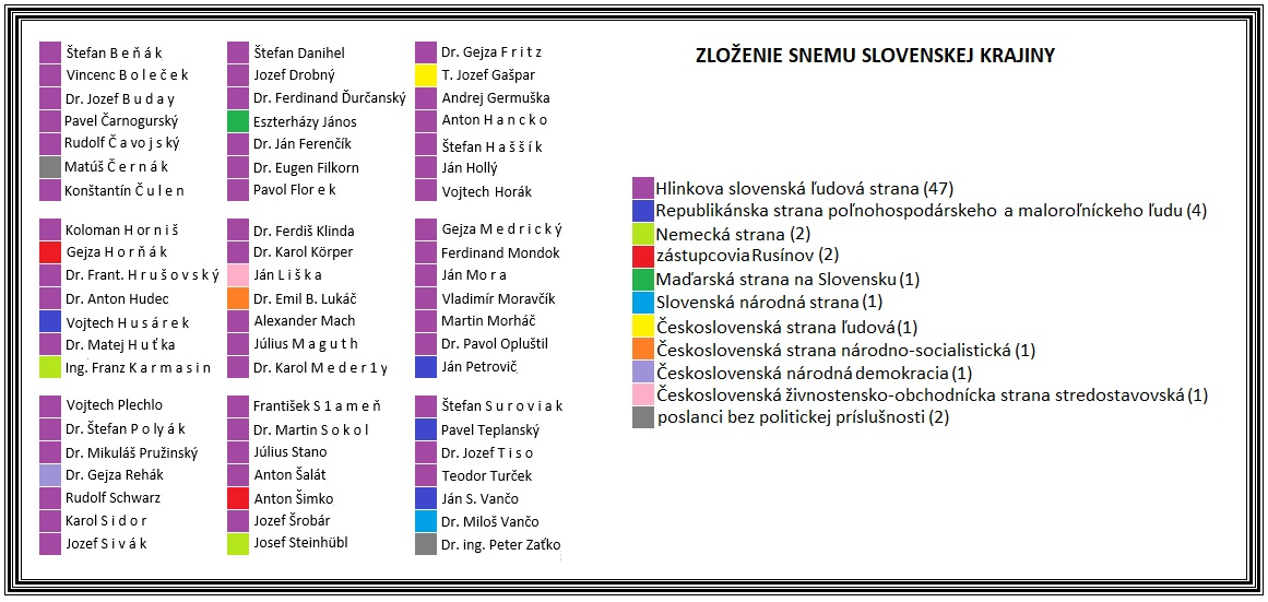 Politická príslušnosť poslancov snemu pred zlúčením strán s HSĽS.